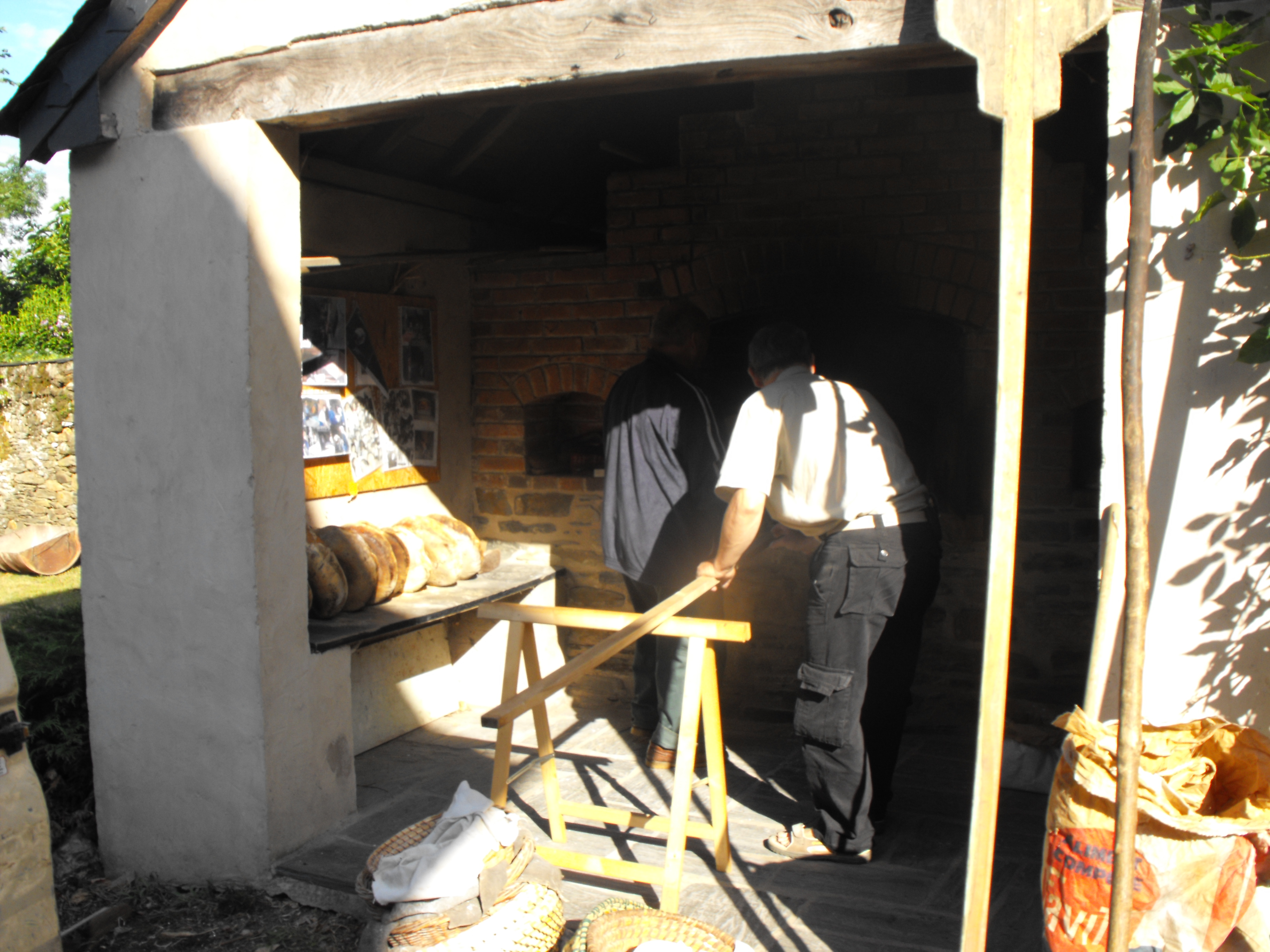 Cuisson du pain pour la fête de l'Amicale Saillantaise, par Gustou et Daniel.